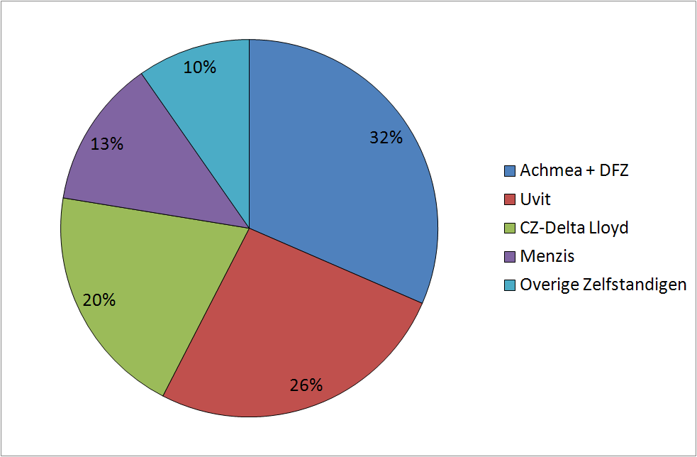 Zorgverzekeraars Nederland marktverdeling 2009 op basis van cijfers van de website van de NZa